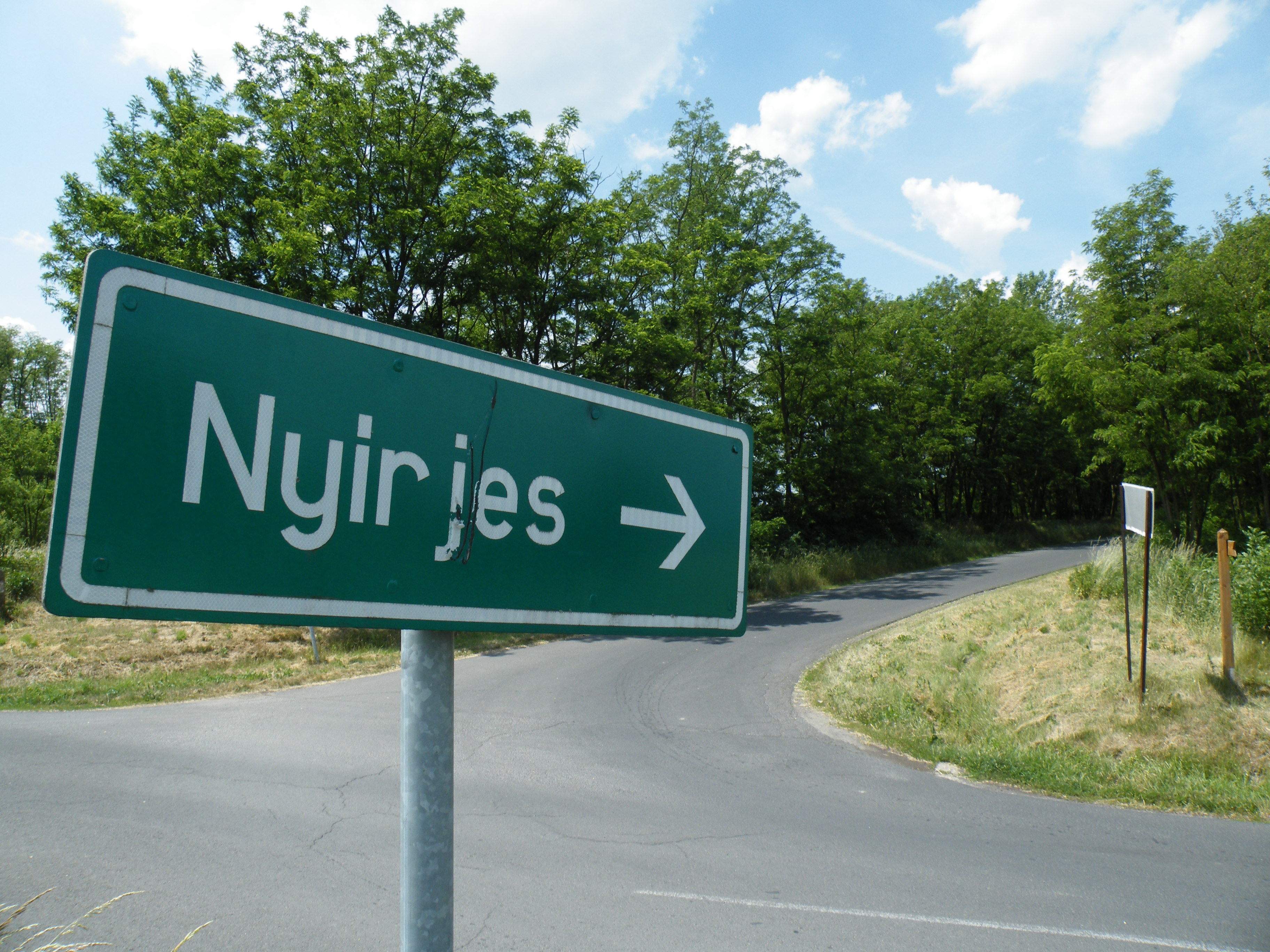 Nyírjesi elágazás, irányjelző közúti jelzőtábla